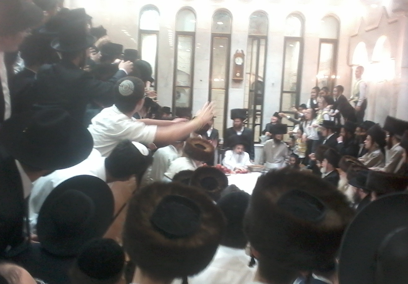 האדמו"ר משומרי אמונים בירושלים, בבית המדרש של החסידות במאה שערים. זורק תפוחים בטיש הקפות שניות התשע"ט